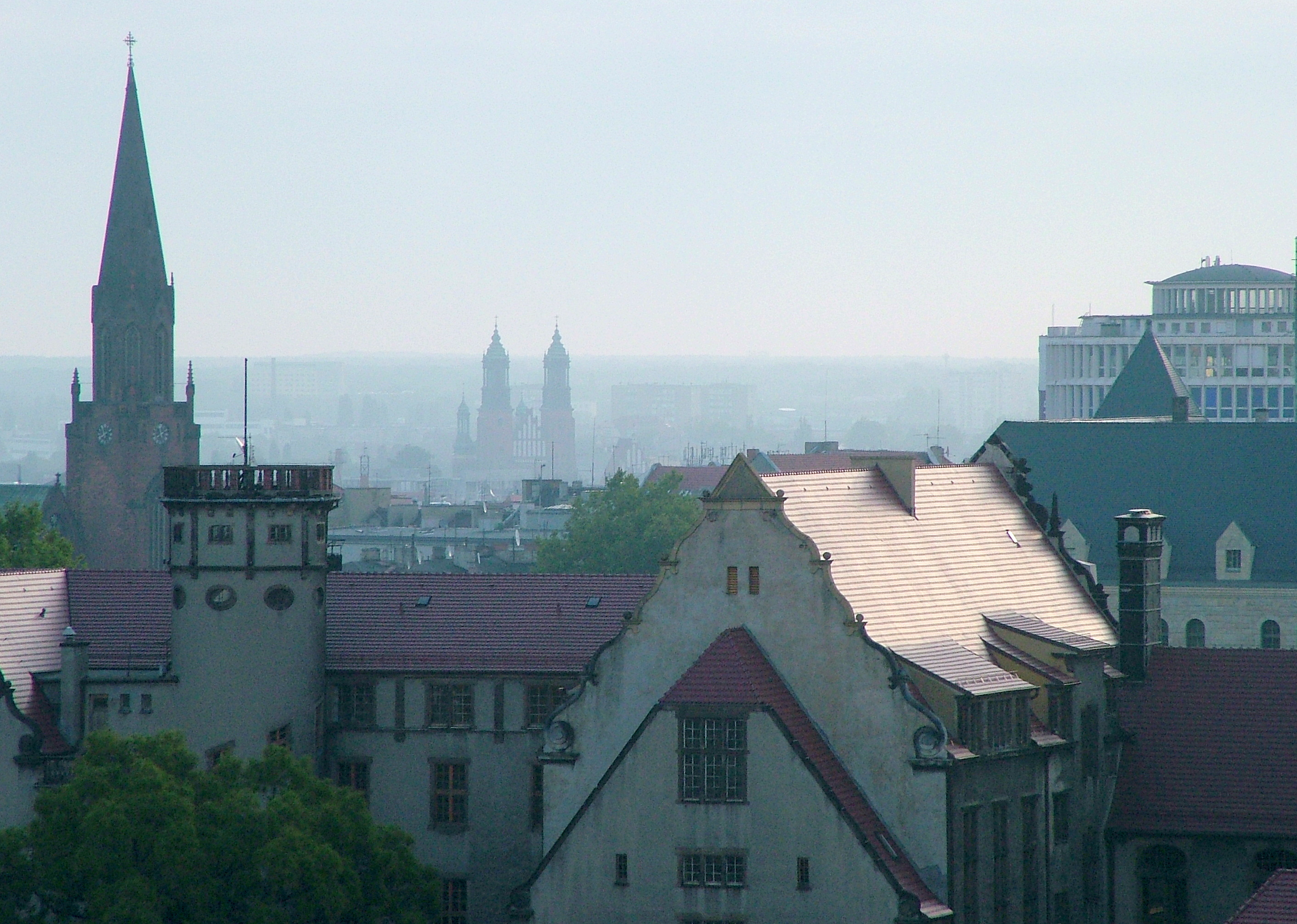 Poznan